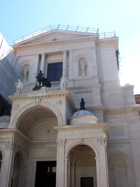 Bergamo - Duomo (in restauro)